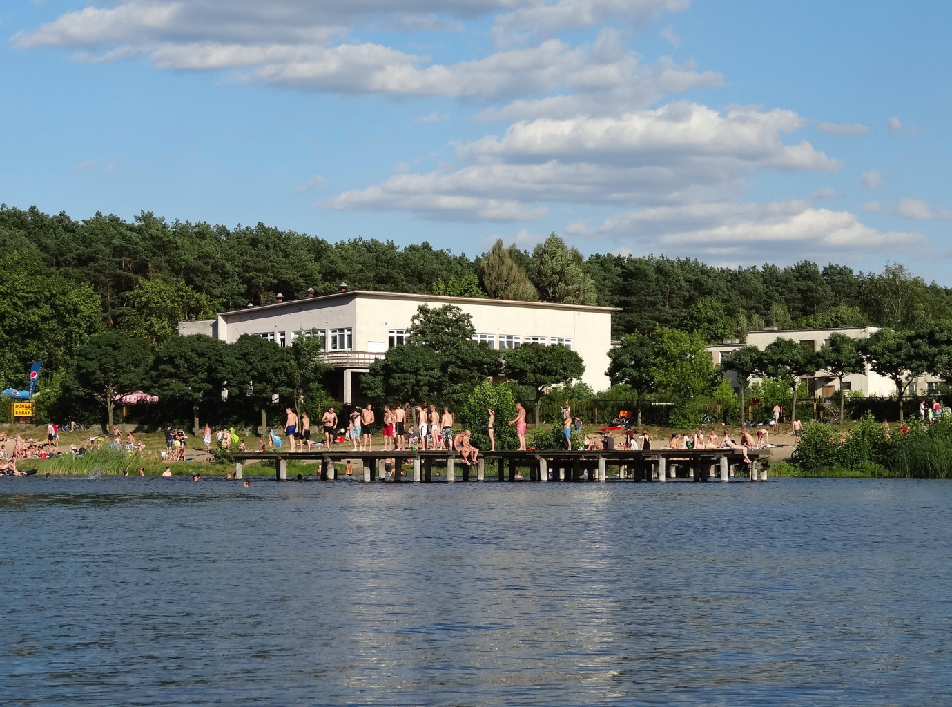 Jezioro Jezuickie w Pieckach w Puszczy Bydgoskiej, gm. Nowa Wieś Wielka